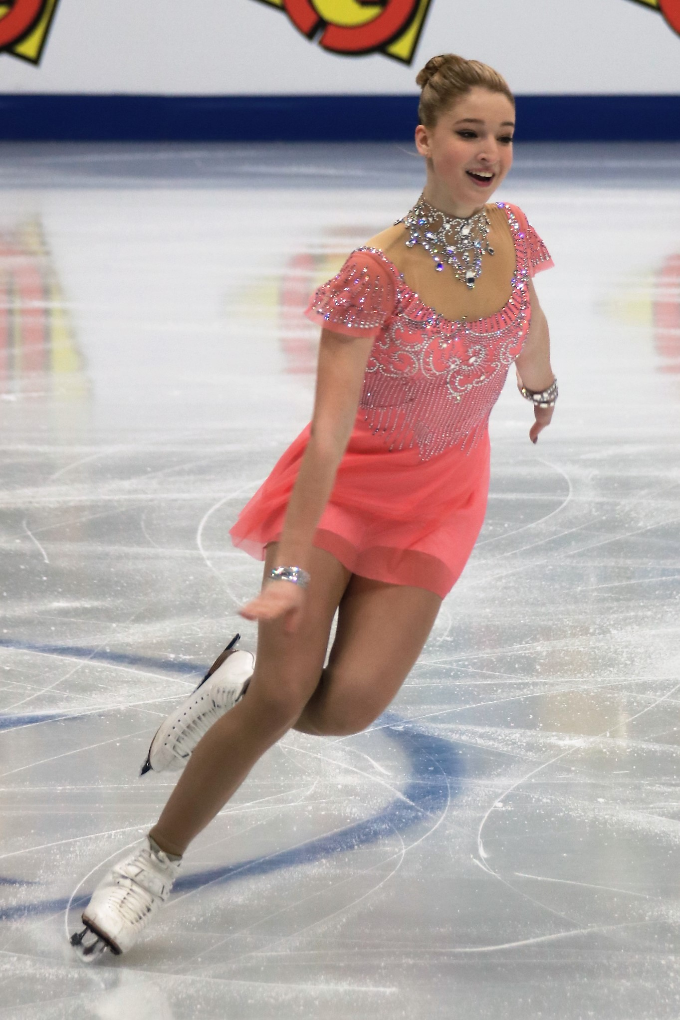 Мария Сотскова (Россия) на Чемпионате Европы по фигурному катанию 2018.